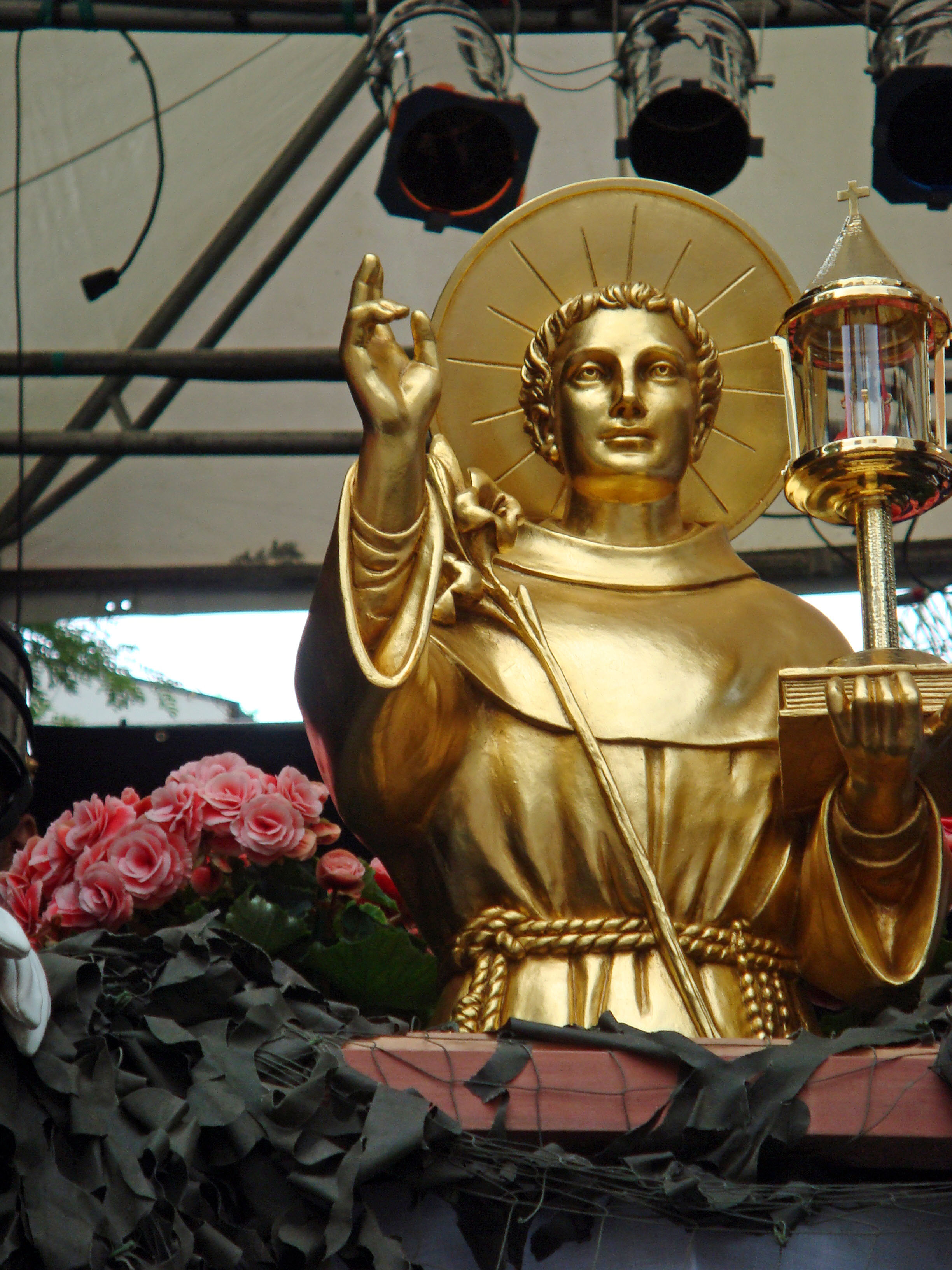 Relíquias de Santo Antônio - três partes autenticadas do corpo do santo, vindas da Basílica de Pádua, na Itália.